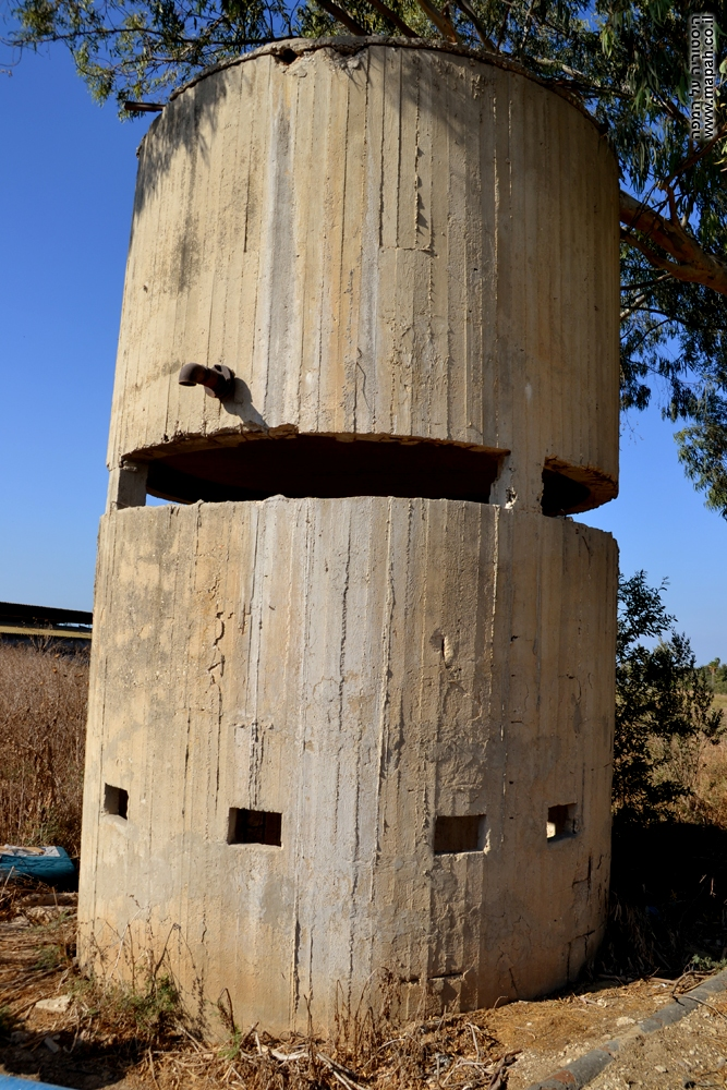 פילבוקס שנראה משולב עם מגדל מים בכניסה הראשית למושב באר טוביה